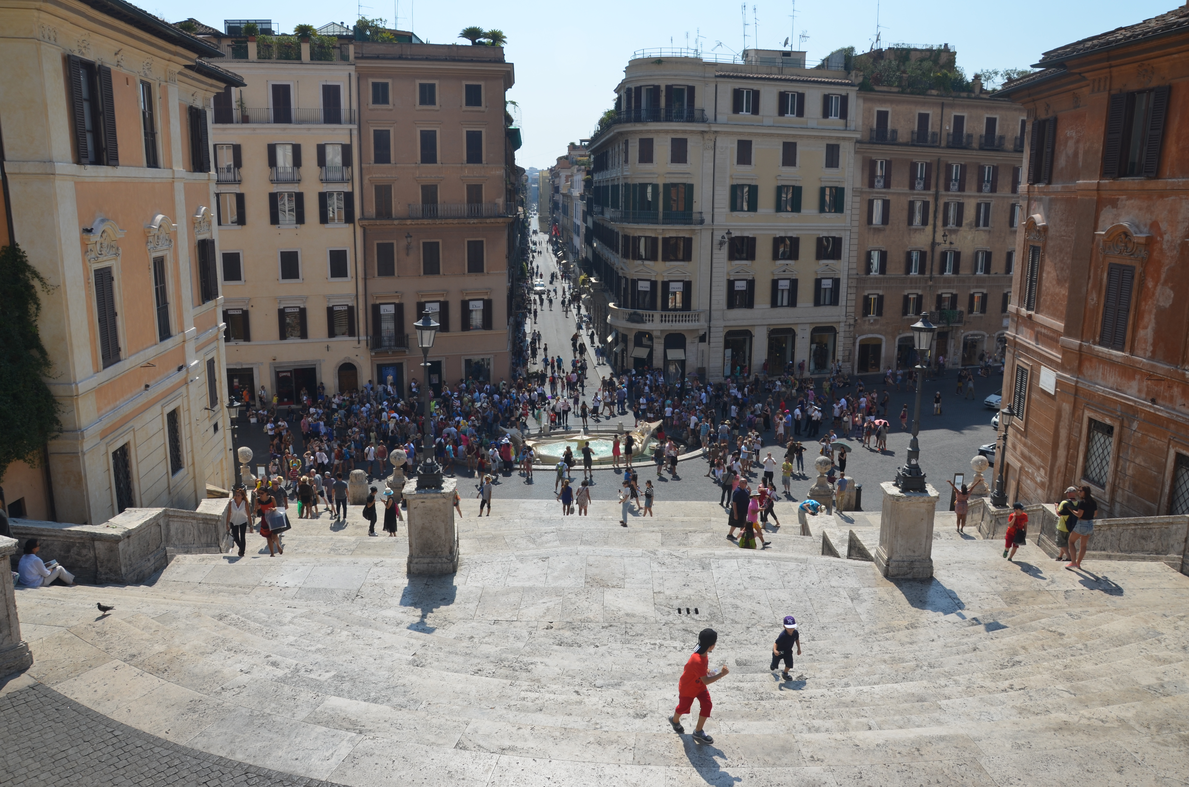 Spaanse trappen in Rome.